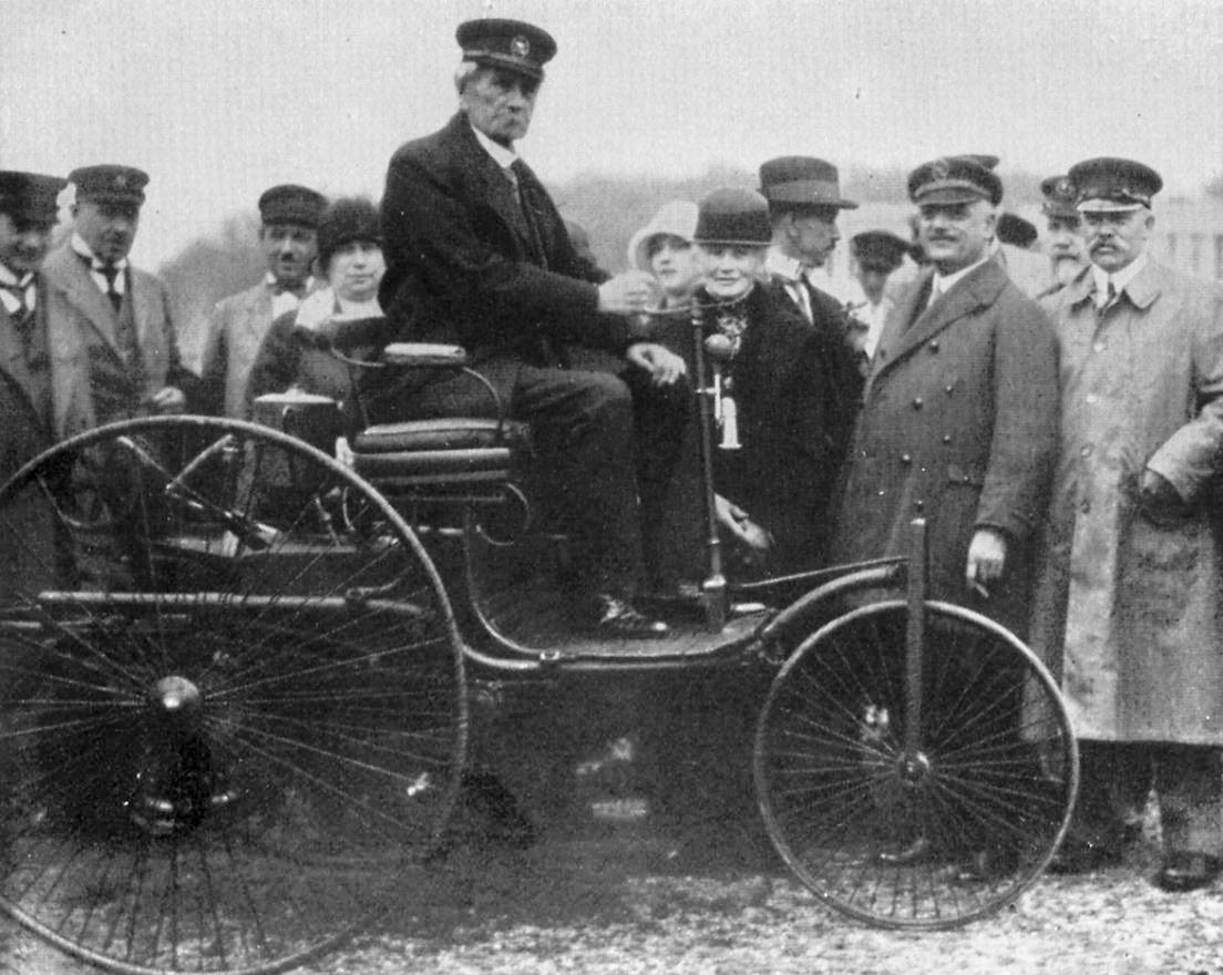 Abb. 31. Der 81jährige Erfinder am Steuer seines ersten Wagens ...